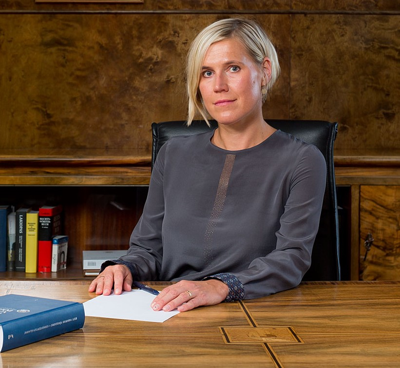 õiguskantsler Ülle Madise